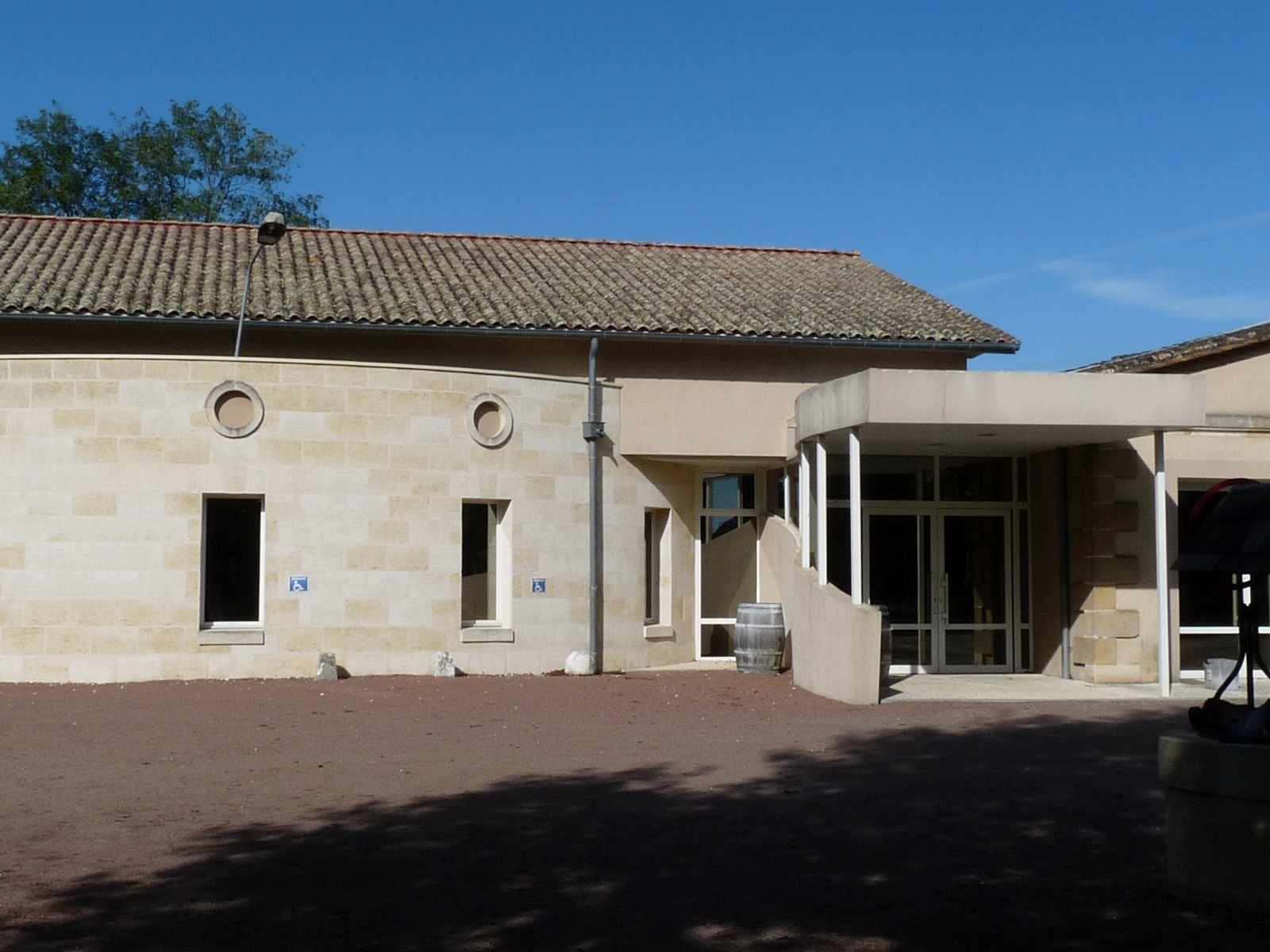 Mairie de Saint-Trojan, Gironde, France